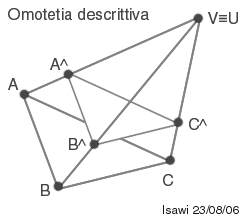 Omotetia Descrittiva Questa immagine proviene dal sito personale di Hasan ISAWI (docente di geometria descrittiva all'Università "la sapienza" di Roma). Autorizzazione accordata : OTRS #2006051010012313